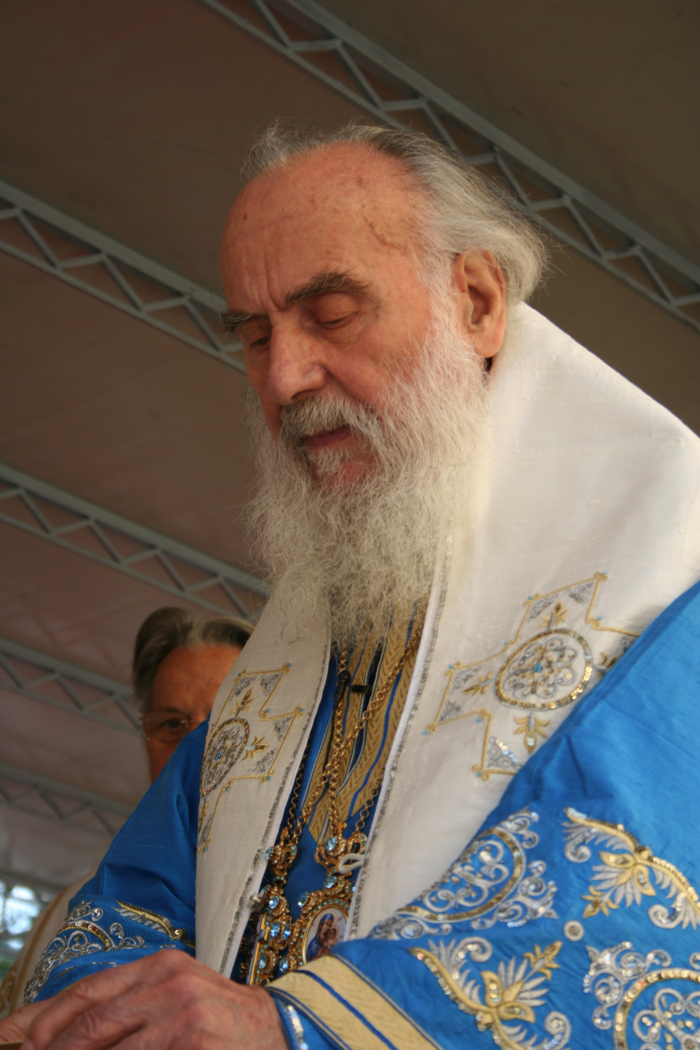 Manastir Tronoša-proslava 700 godina postojanja